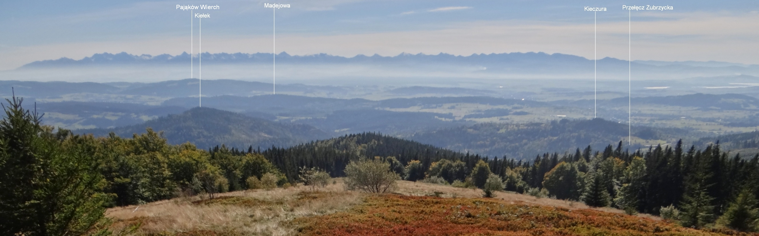 Widok z Hali Krupowej na Tatry i Beskid Orawsko-Podhalanski